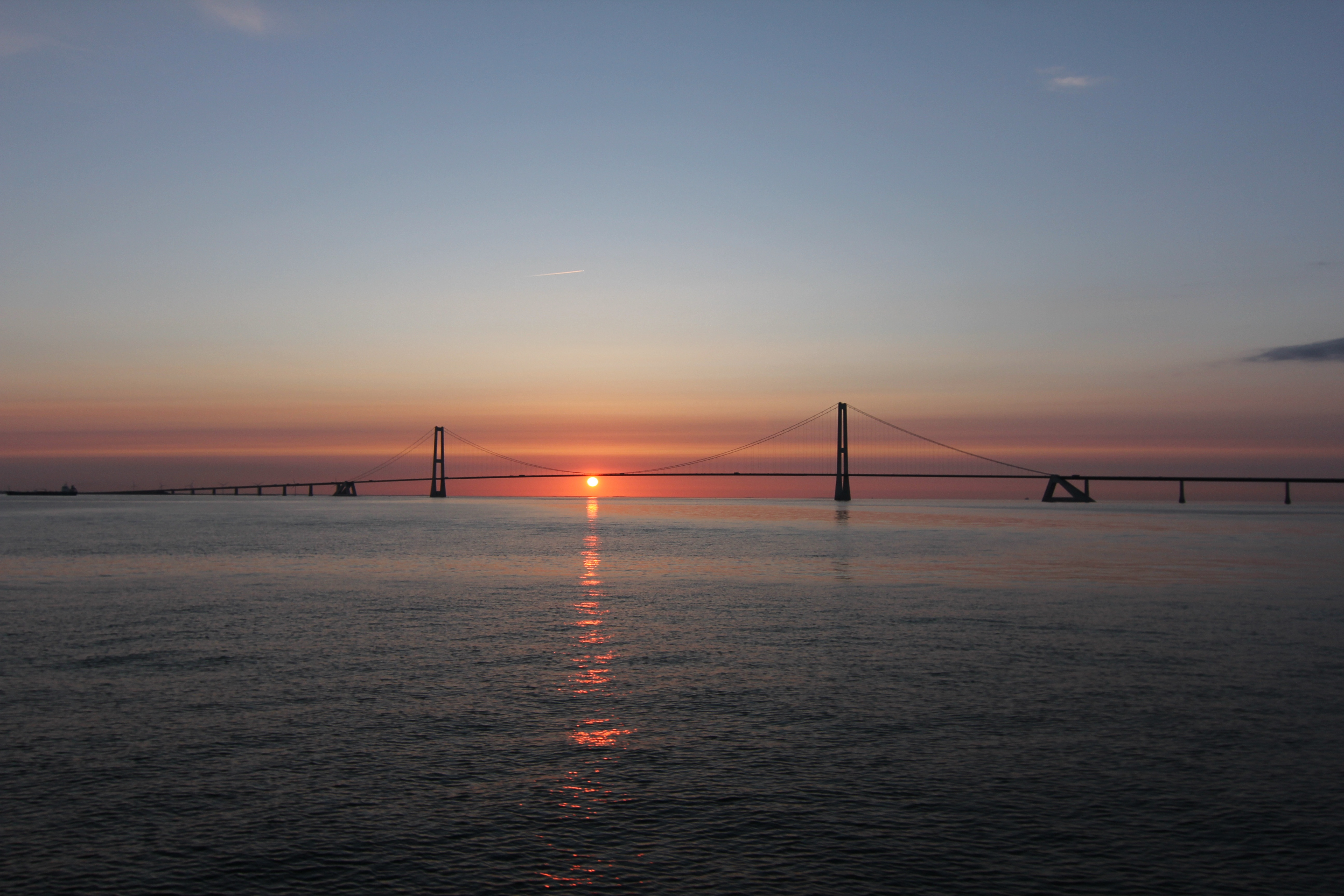 Storebæltsbroen set fra syd